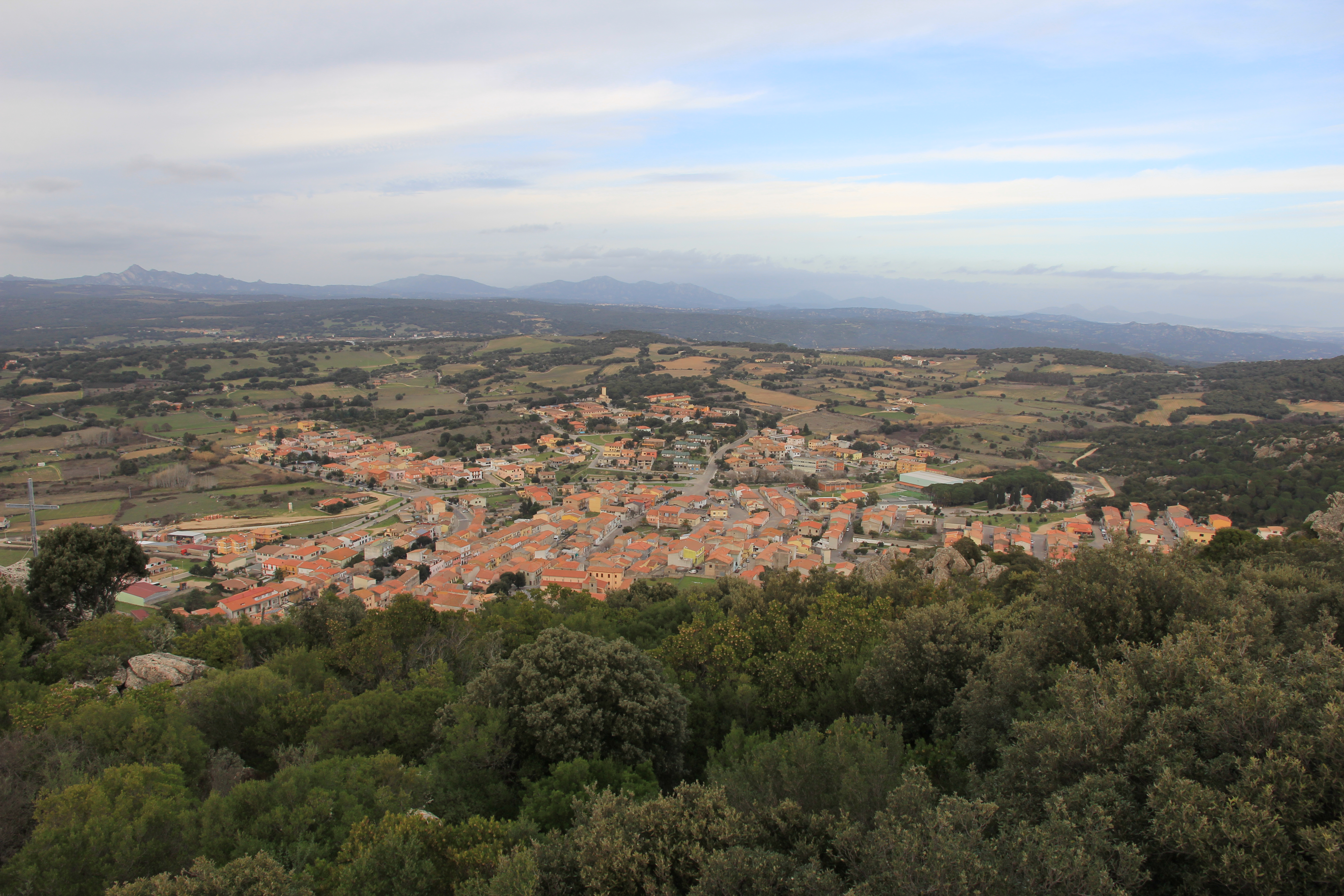 Monti (pr. Tempio Olbia)